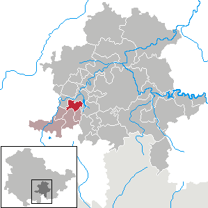 Oberweißbach/Thür. Wald in Thuringia - District Saalfeld-Rudolstadt